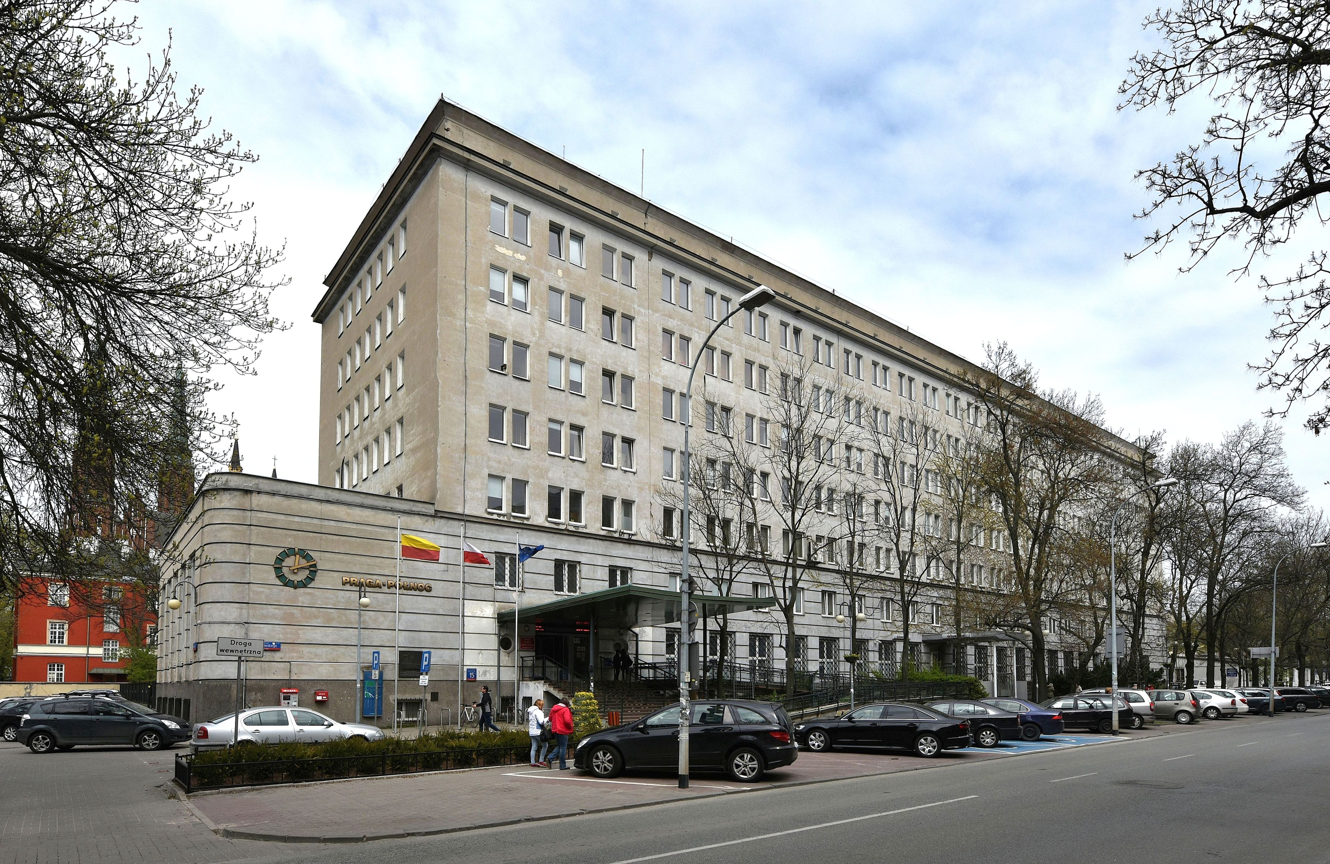 Urząd Dzielnicy Praga-Północ przy ul. ks. I. Kłopotowskiego 15 w Warszawie